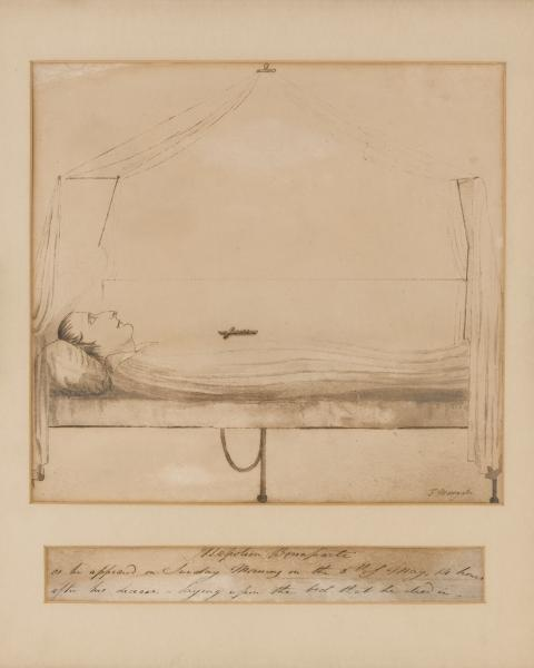 Skizze des toten Napoleon von Frederick Marryat 1821Die Inschrift lautet: „Napoleon Bonaparte as he appeared on Sunday morning on the 6th of May, 14 hours after his death, laying upon the bed that he died in.“